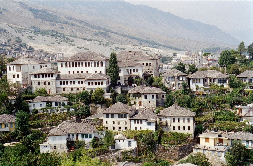 Gjirokastra, Albania